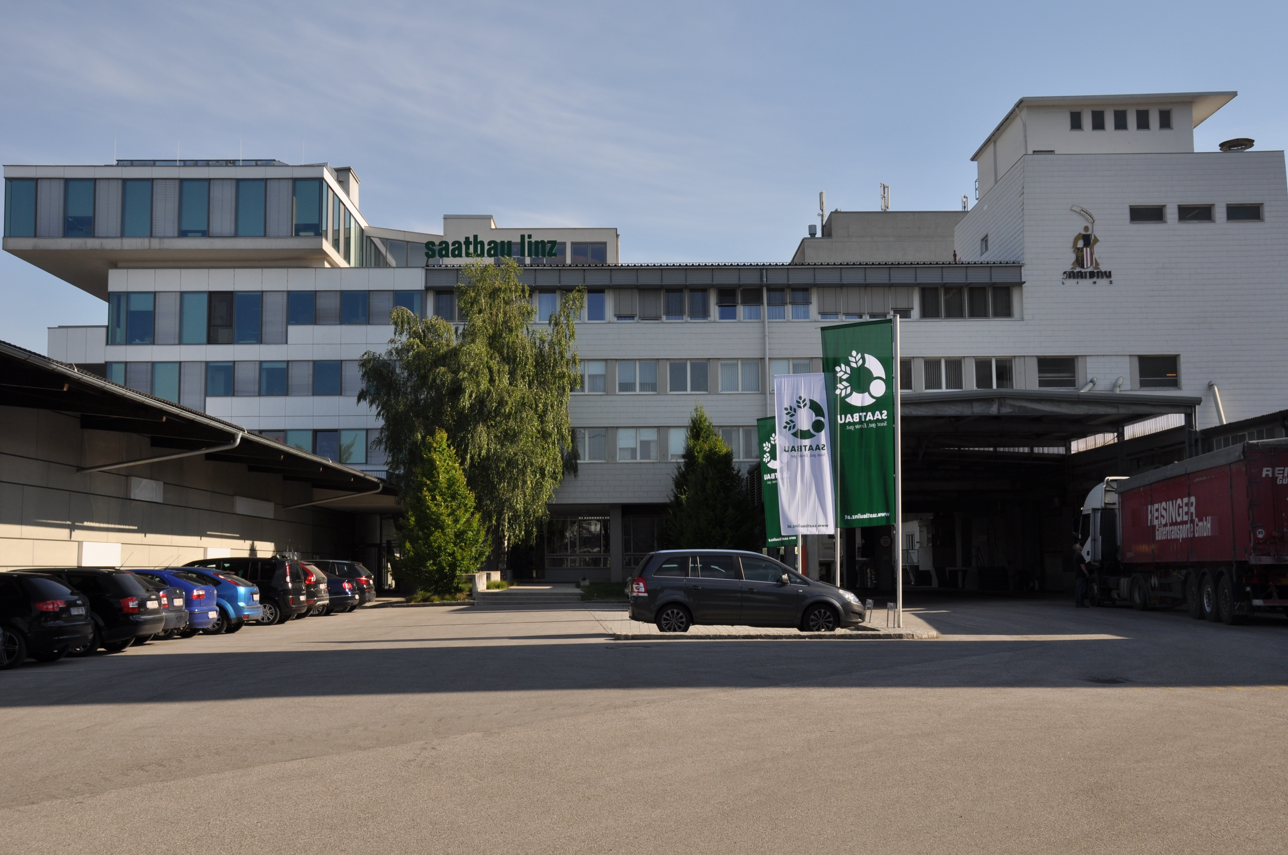 Saatbau Zentralen in Leonding (Linz)